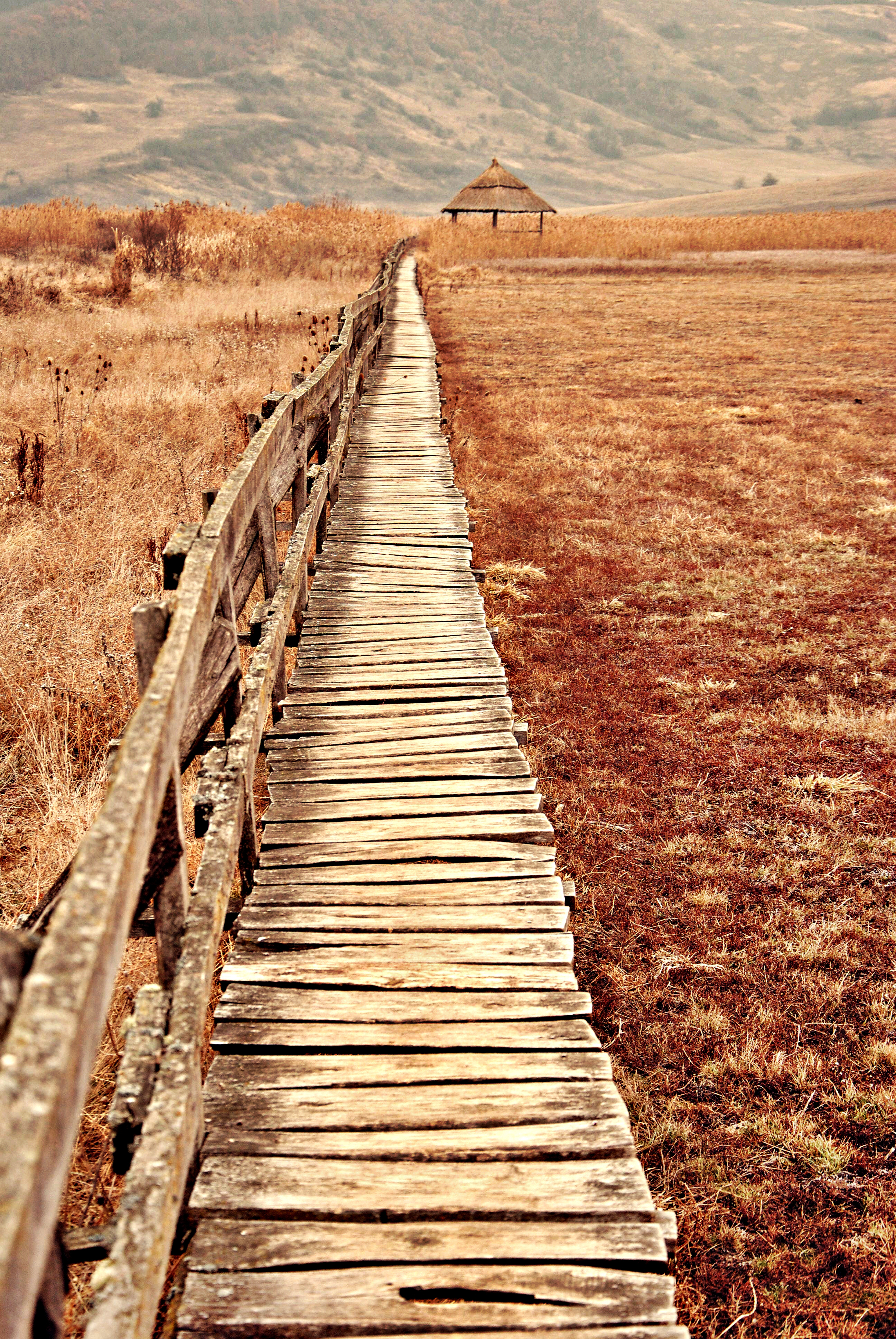 Stufărișurile de la Sic, judeţul Cluj